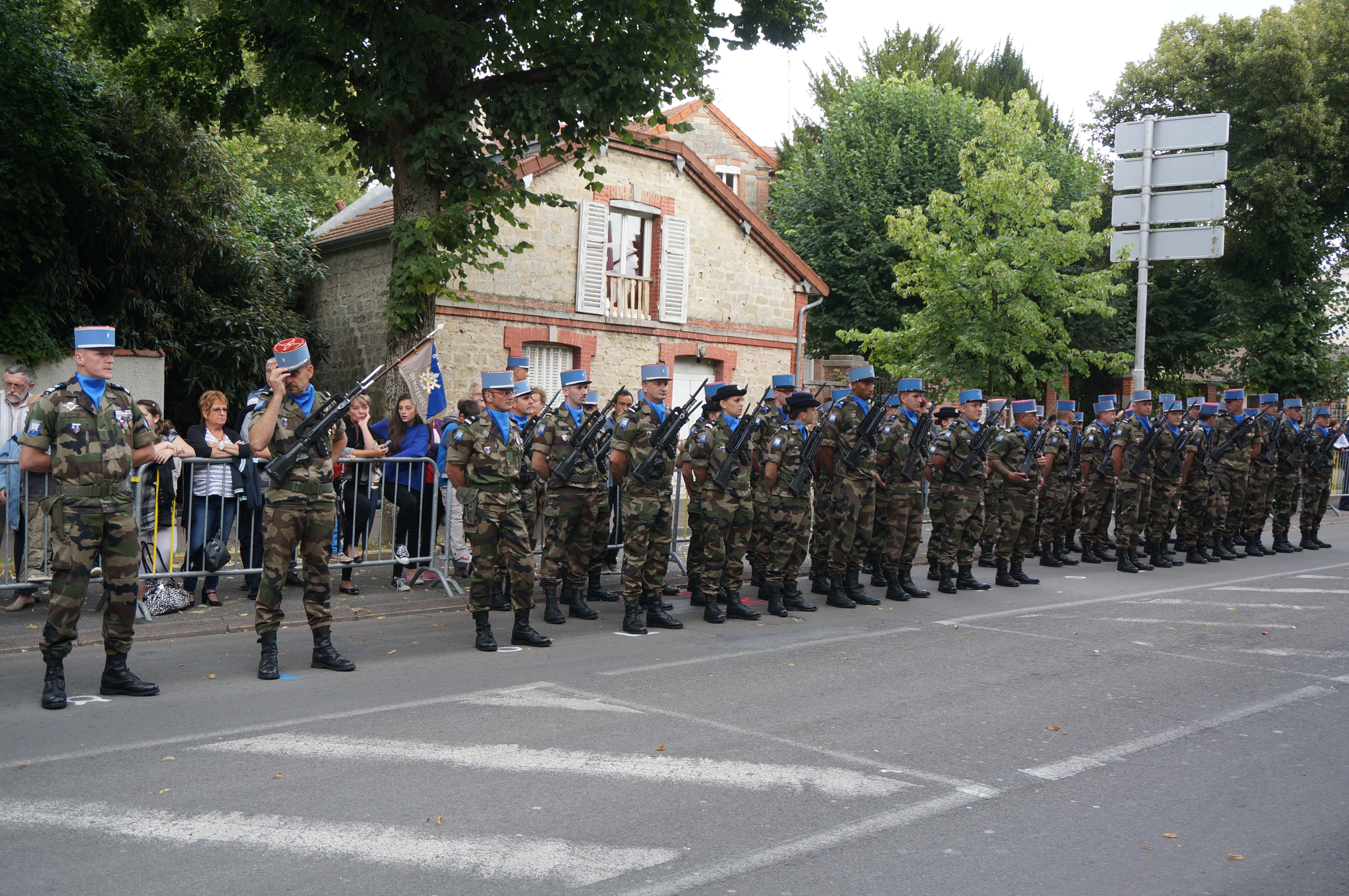 8_régiment_du_matériel, la compagnie de commandement et de soutient.